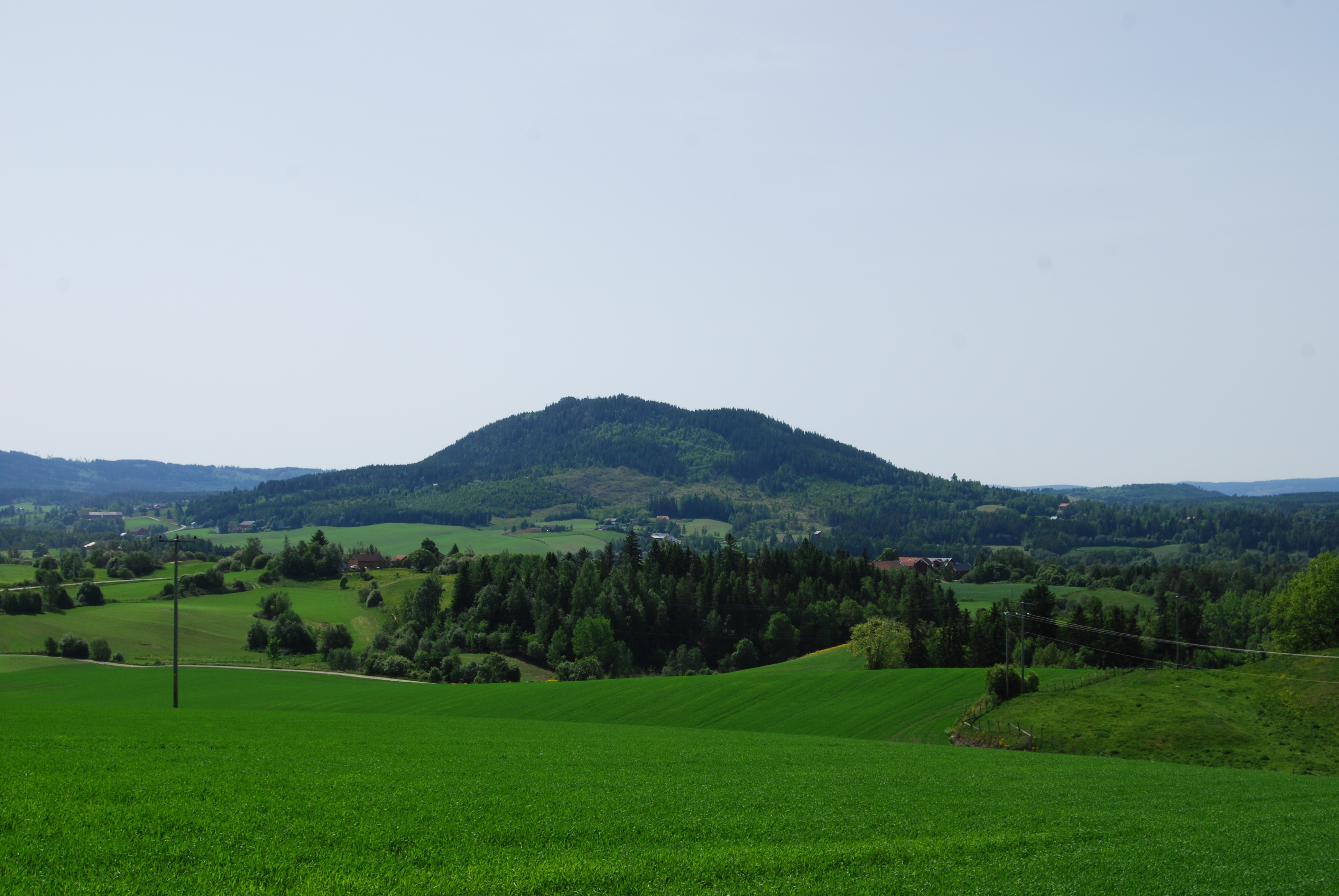 Sølvsberget / Silver mountain in Gran, Norway.